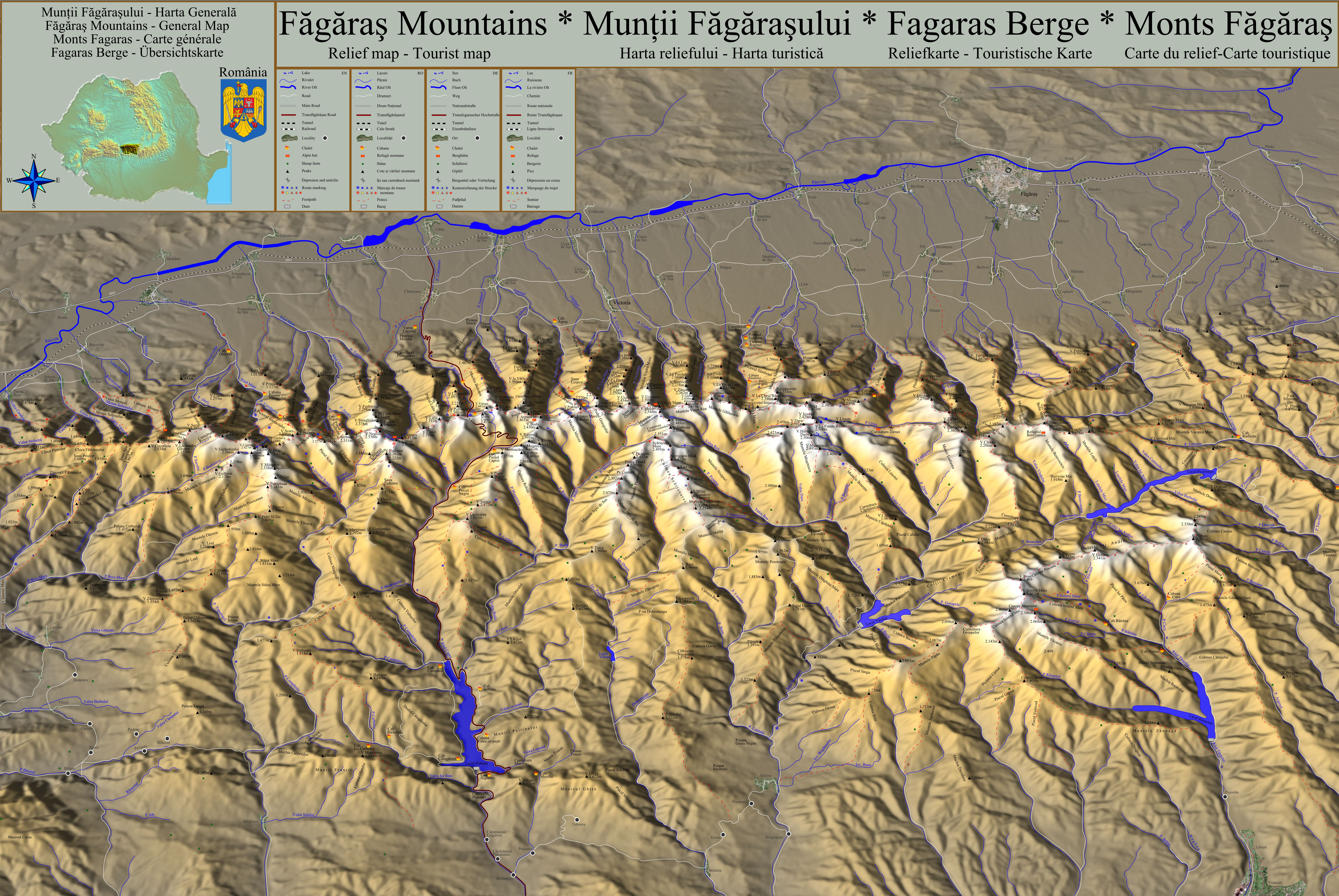 Harta reliefului si turistică a Munţilor Făgăraşului. Imagine realizată cu 3DEM şi Inkscape folosind Texte şi Background al reliefului. Pentru modificări ale imaginii se urmează paşii:1. Se descarcă fişierul Background şi Textele.2. Se suprapun Textele peste Background în Inkscape.3. Se fac modificările în Inkscape.4. Se exportă imaginea noua formată din Inkscape într-un fişier PNG cu 180dpi, după care se transformă PNG-ul în JPG.5. Se încarcă noua imagine JPG, cu upload.6. Se încarcă noul fişier SVG cu Texte, cu upload.